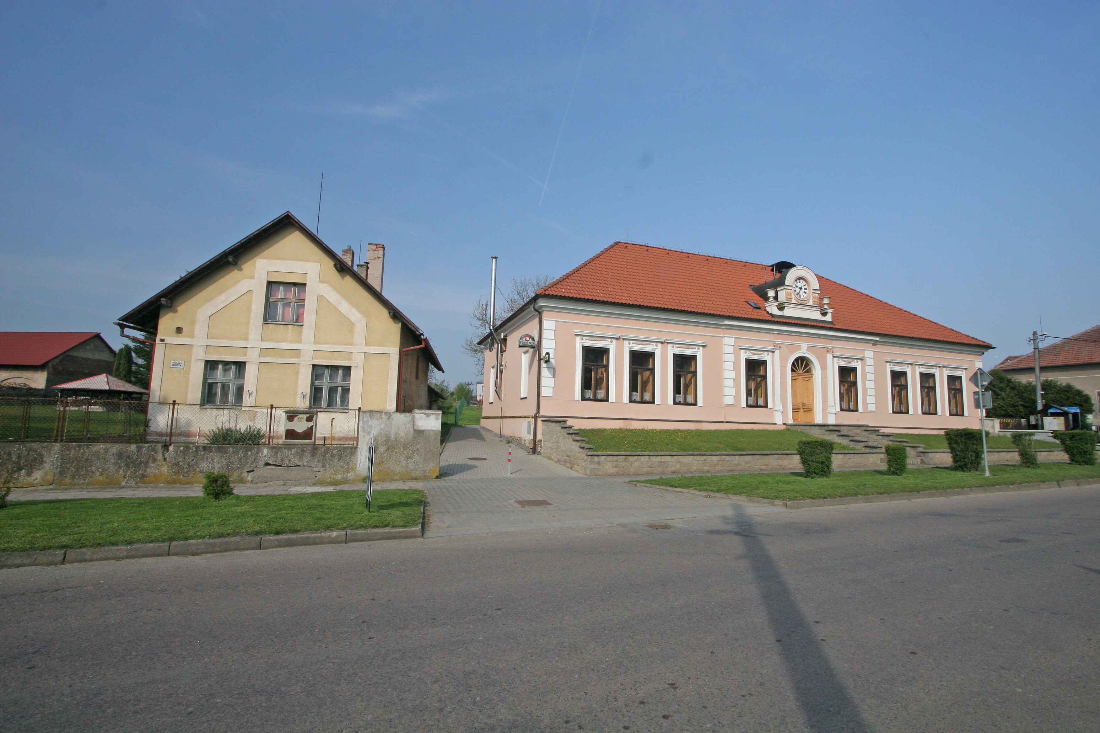 Bezděkov obecní úřad